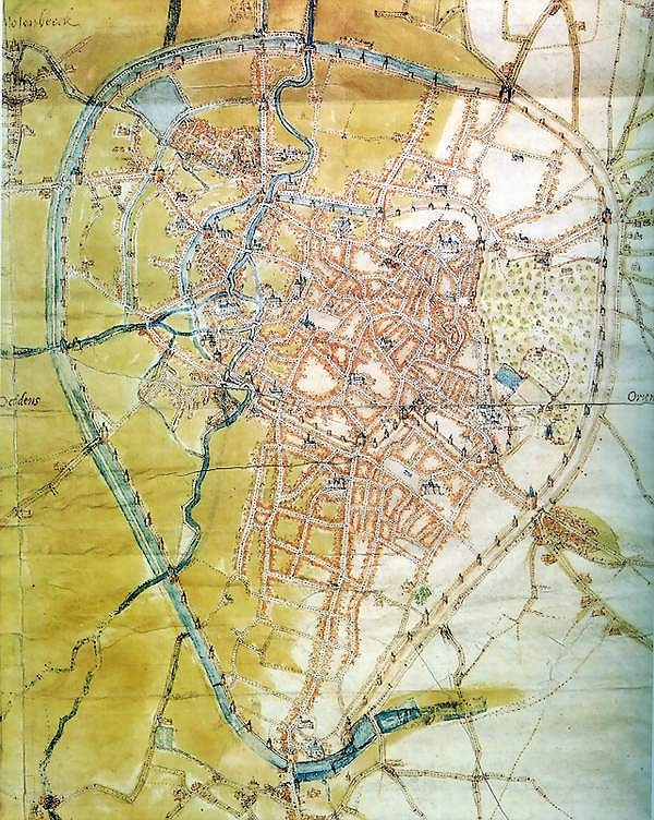 Map of Brussels, 1555